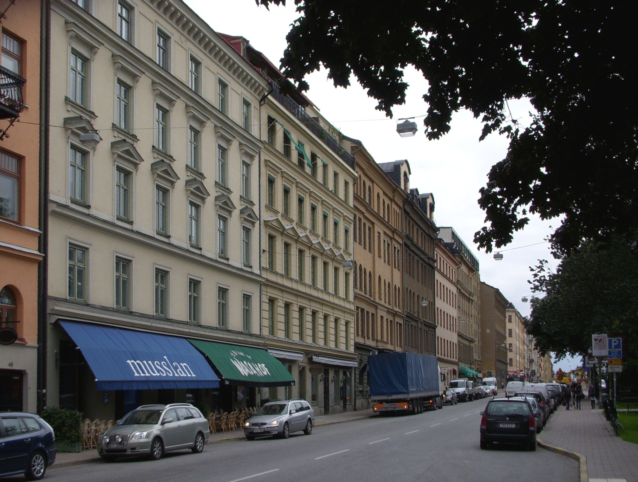 Dalagatan nr 46 i Stockholm, Astrid Lindgrens hem 1941-2002